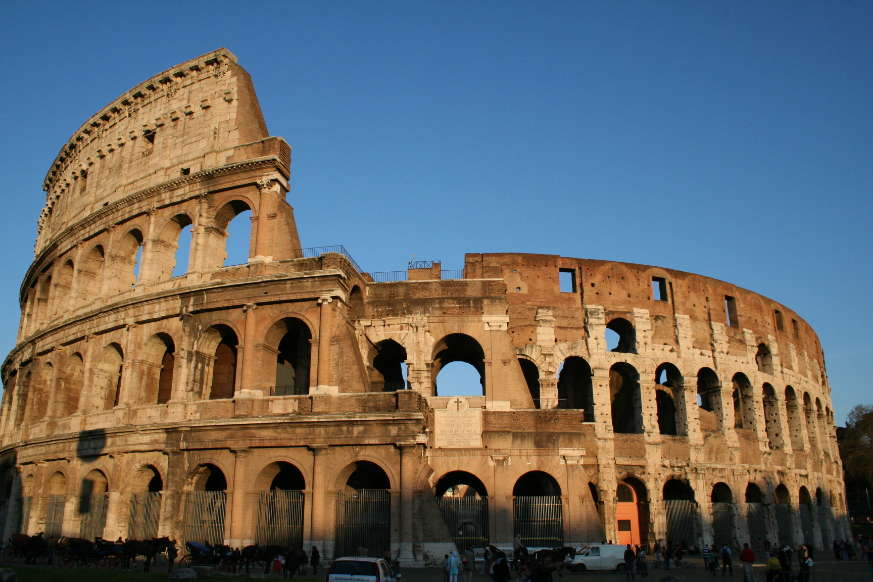 Colosseo